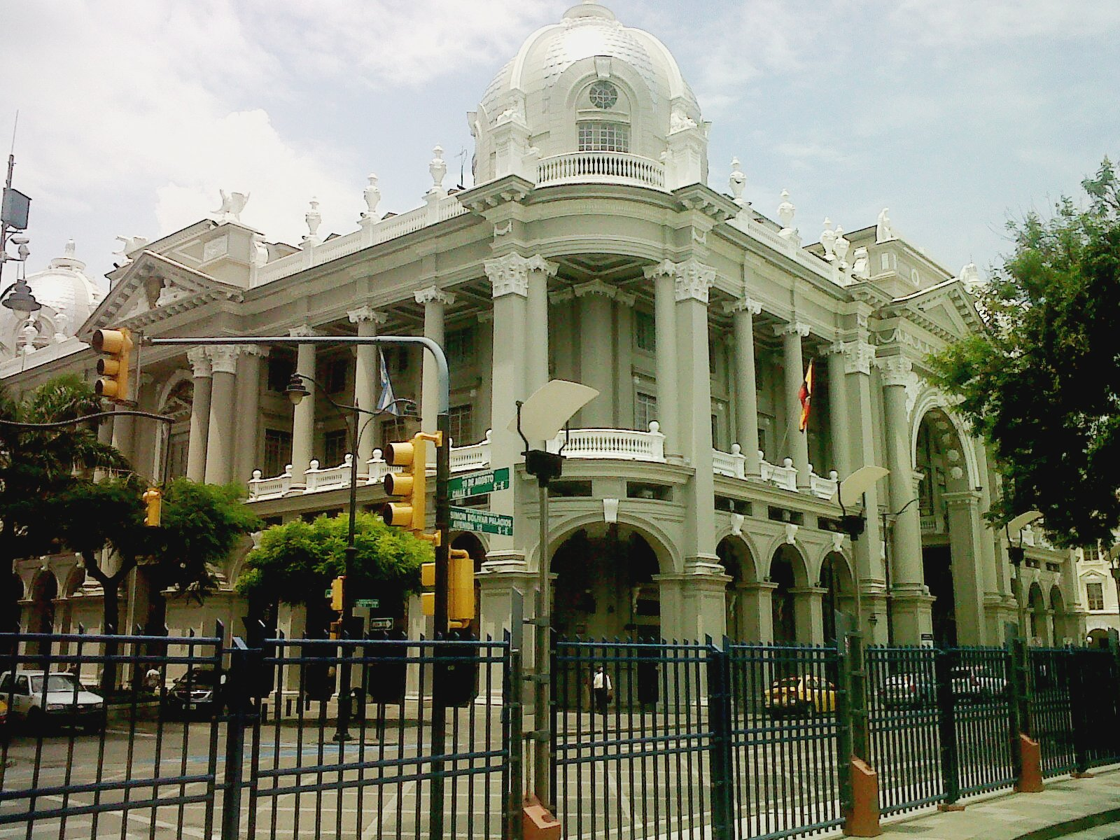 Palacio Municipal desde el Malecón 2000.